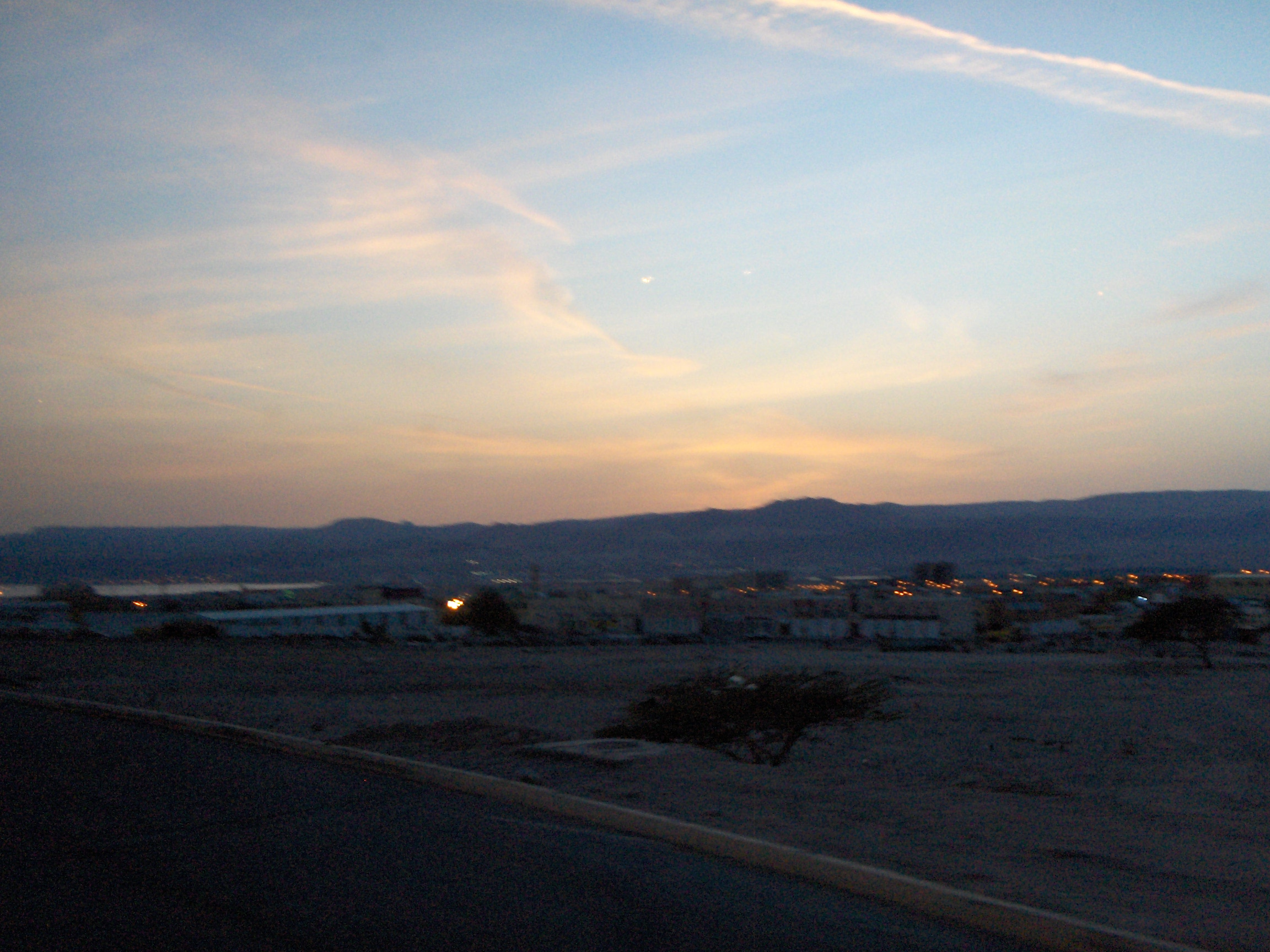 Eilat vista da Aqaba